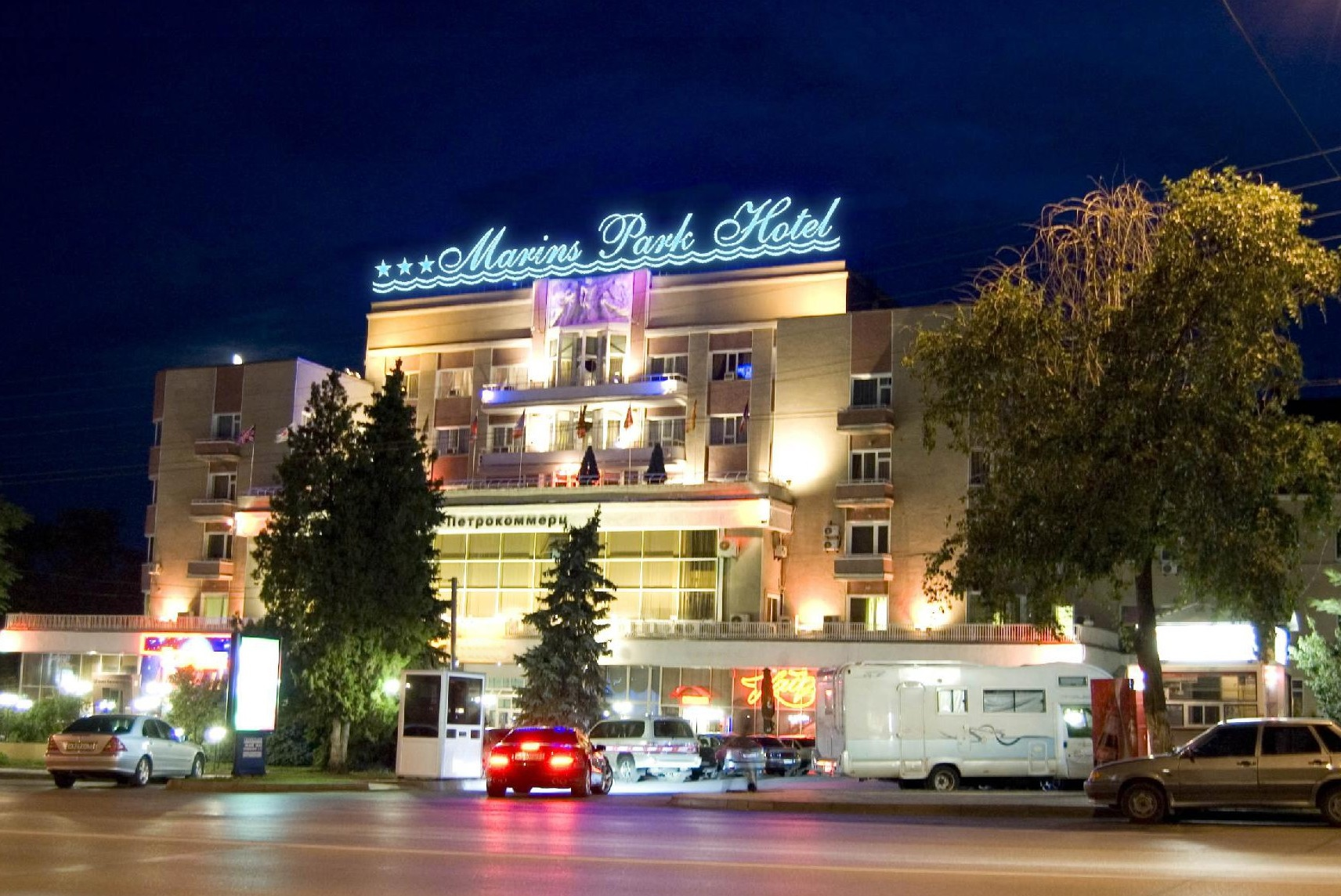 Маринс Парк Отель